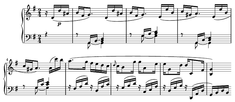 Inicio del primer tema del primer movimiento de la sonata Op 14 nº 2 de Ludwig van Beethoven